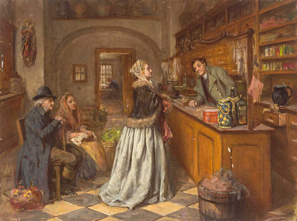 Blick in eine Apotheke mit wartenden Kunden und Apotheker. Öl/Papier auf Holz. 24 x 32 cm